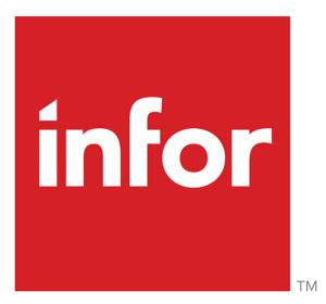 Logo Infor 2013